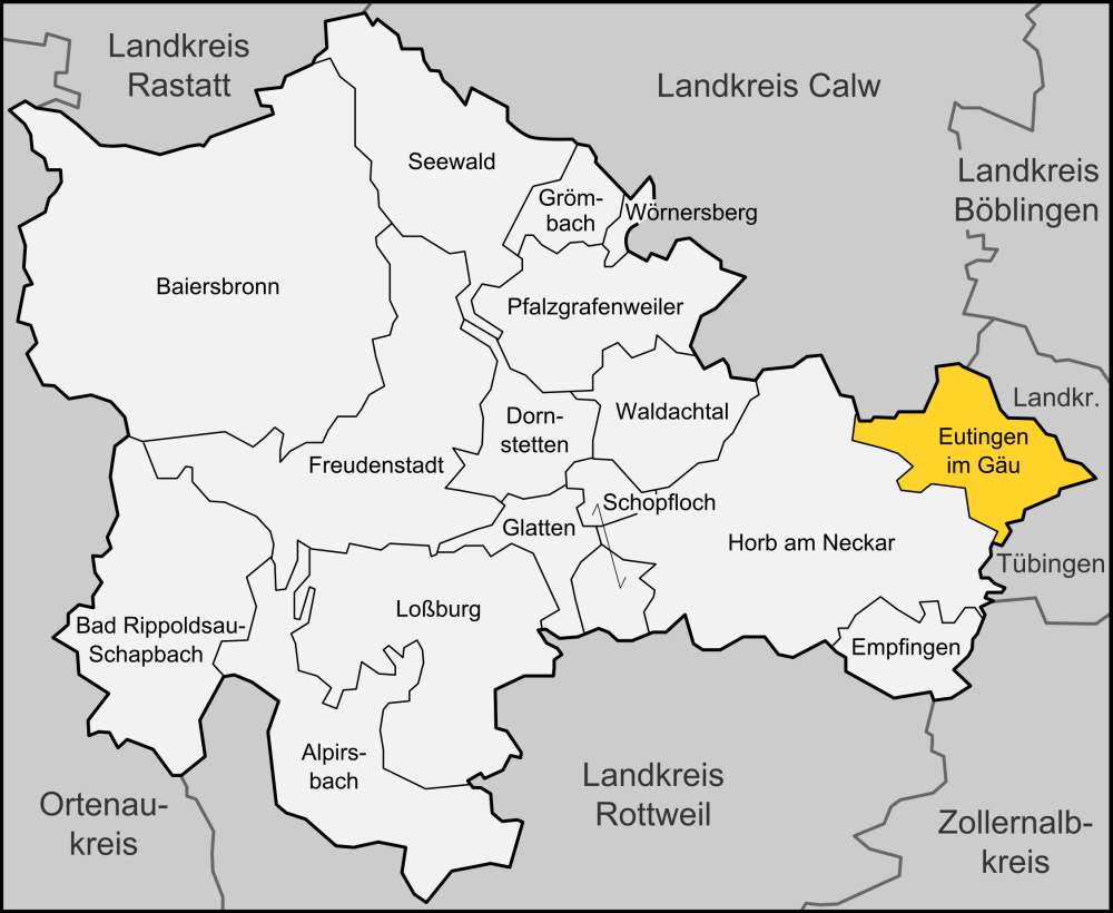 Karte der Gemeinde Eutingen im Gäu im Landkreises Freudenstadt